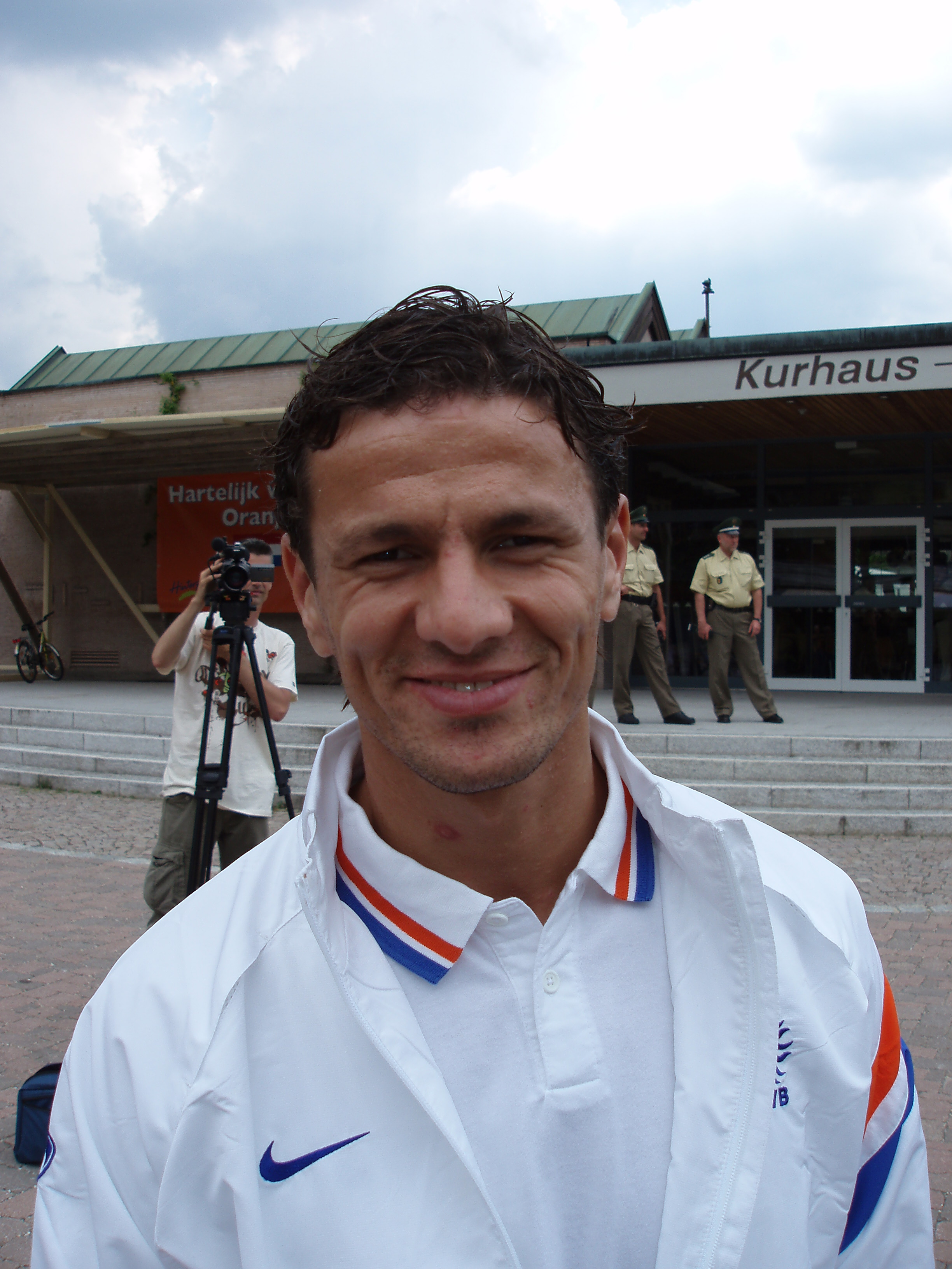 Khalid Boulahrouz, Spieler der niederländischen Fußballnationalmannschaft